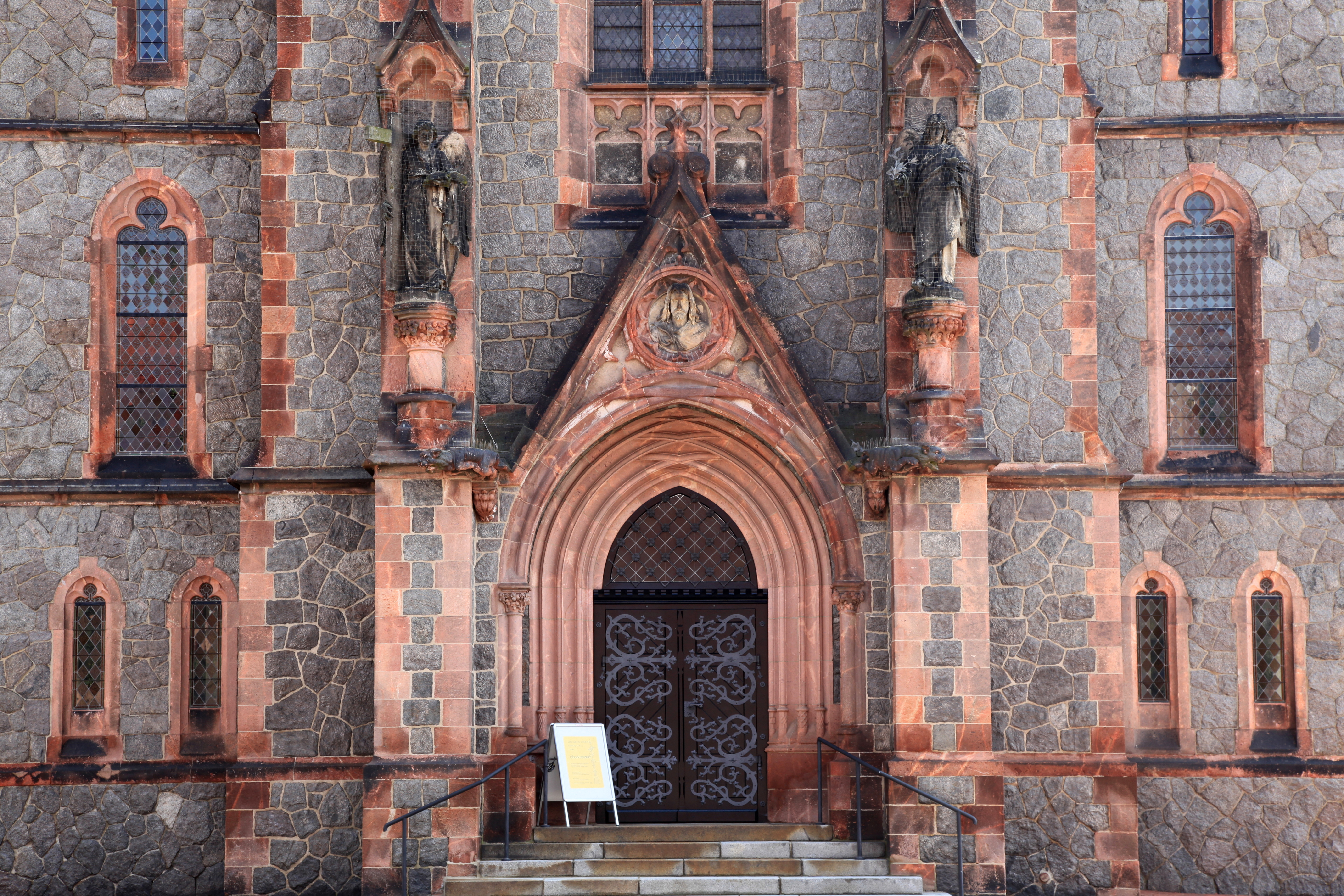 Nikolaikirche, Meißner Straße in Wilsdruff